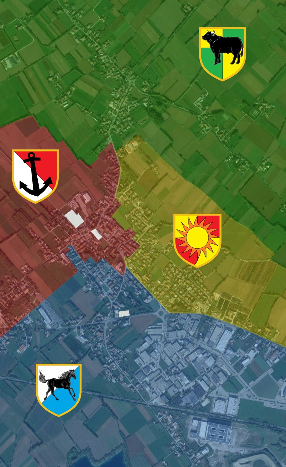 Mappa delle quattro contrade di Padernello